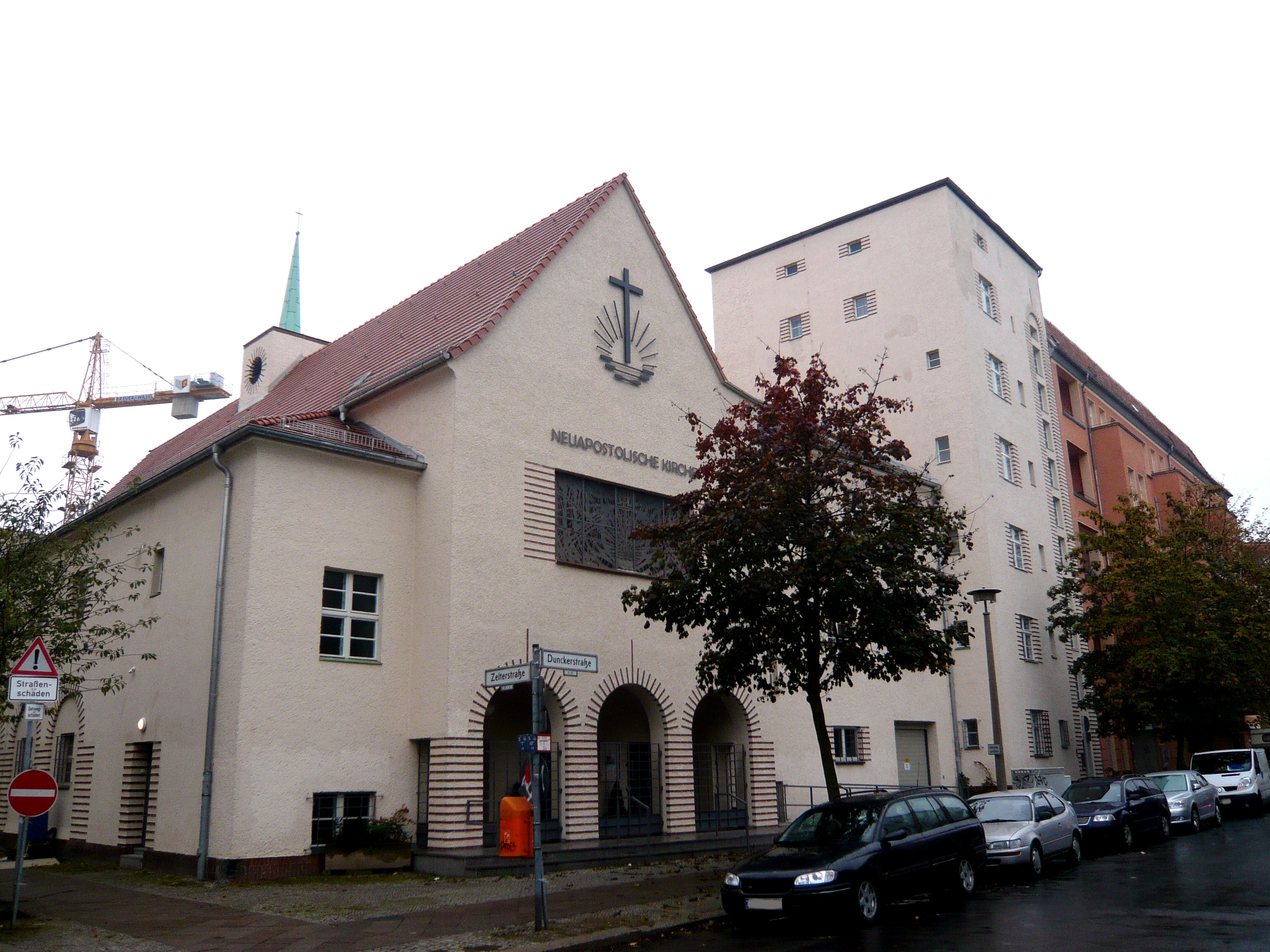 Neuapostolische Kirche, Prenzlauer Berg